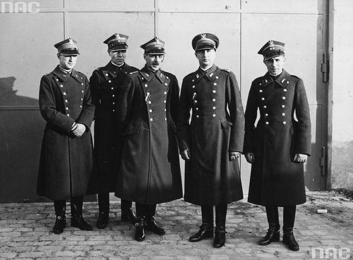 Międzynarodowe Zawody Hippiczne w Berlinie w 1936. Polscy kawalerzyści biorący udział w zawodach. Widoczni od lewej: por. Janusz Komorowski, mjr Wilhelm Lewicki, płk Tadeusz Komorowski (szef ekipy), mjr Zdzisław Dziadulski, por. Czarniawski.